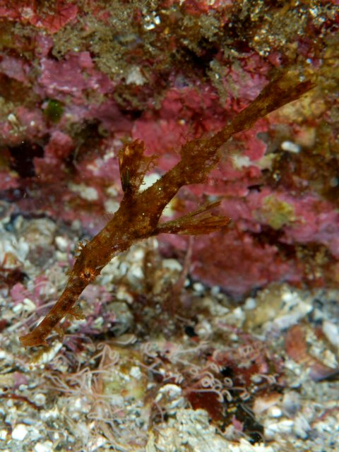 ホソフウライウオ Solenostomus leptosoma